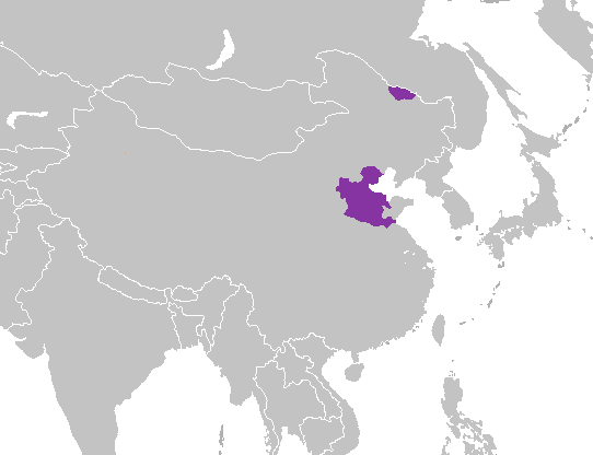 Dialecto Mandarín jilu